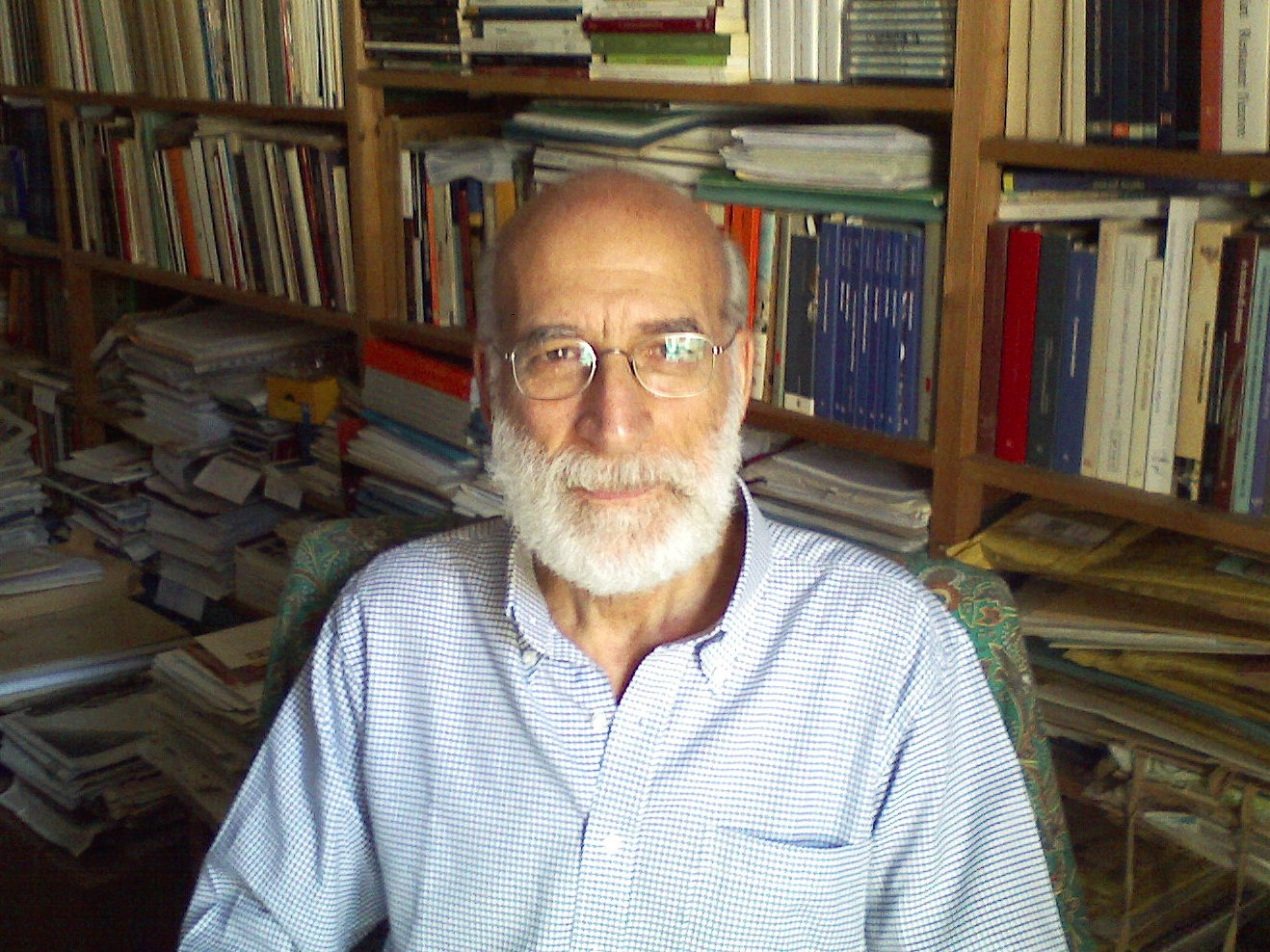 Foto di Giuseppe Basile